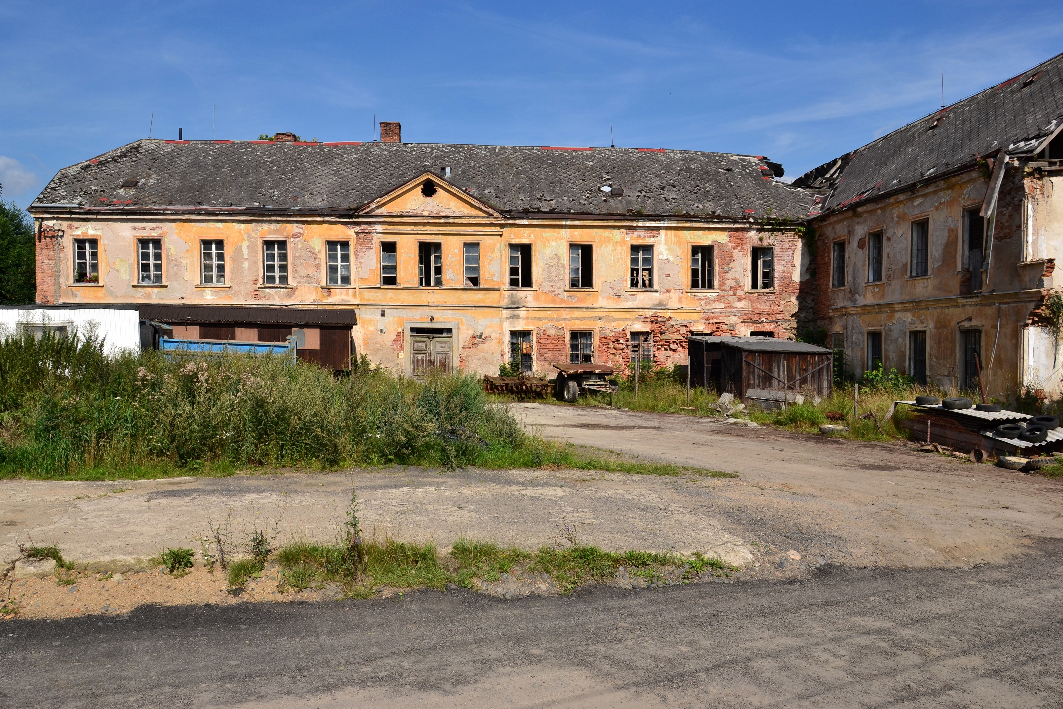 Zámek Děpoltovice, Děpoltovice 1, Děpoltovice.